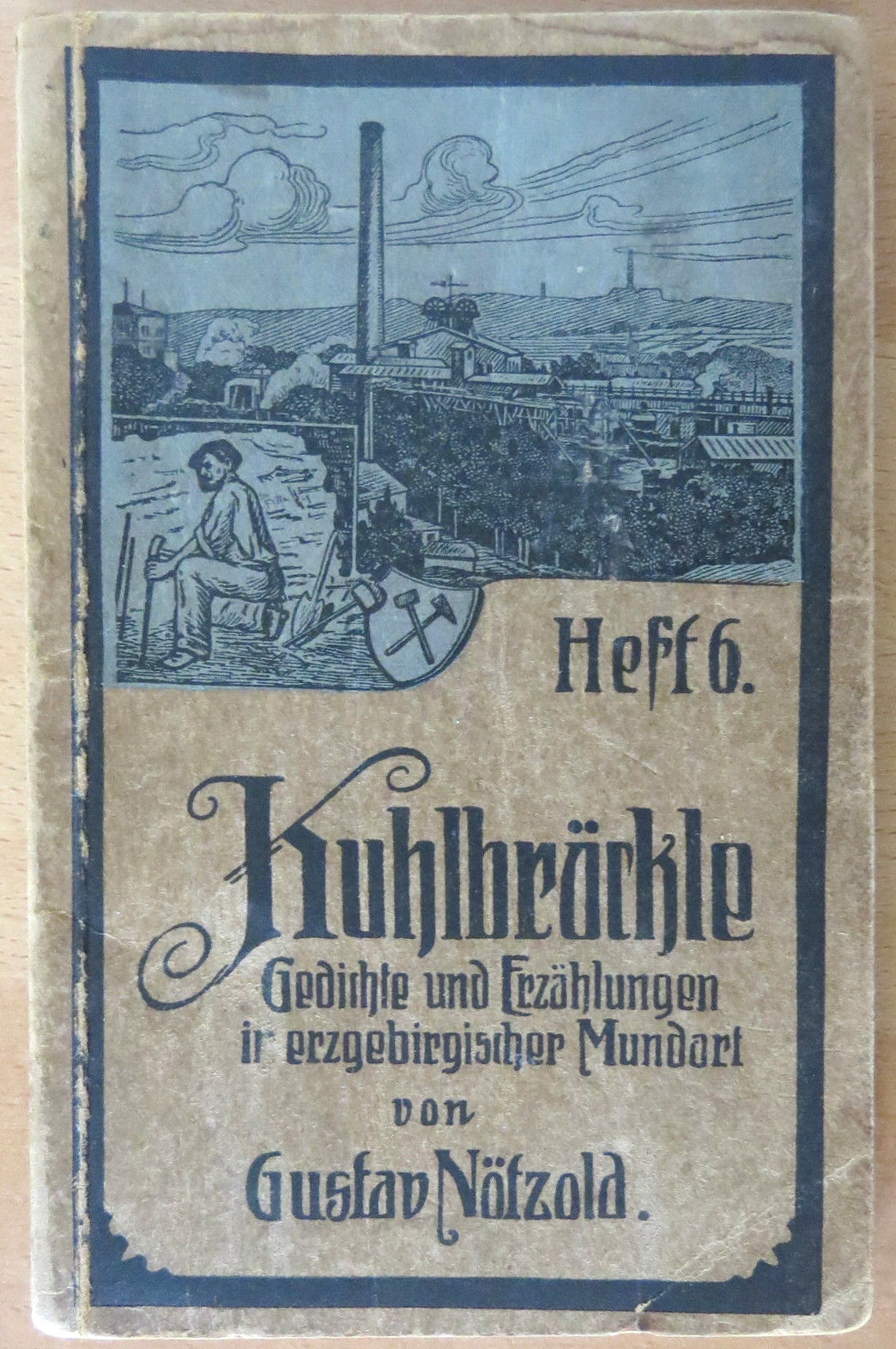 Selbstverlag Gustav Nötzold (gestorben 1939): 9-bändige Zwickauer Mundart Heftenreihe "Kuhlbröckle" (Kohlebröckchen) über die Sprache und den Wortwitz der Bergarbeiter im Zwickauer Steinkohlerevier